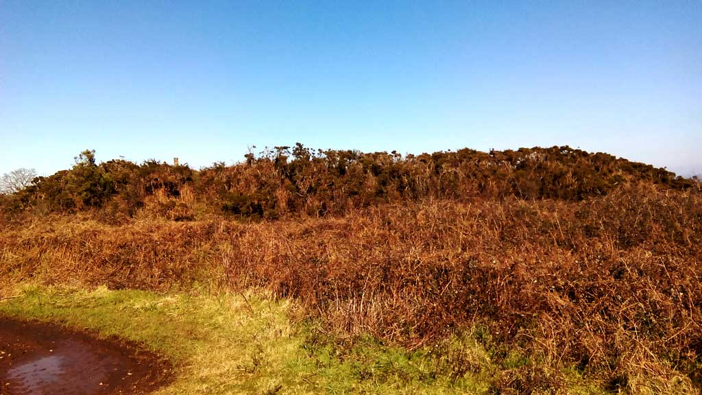 Vista de Castro Maior, Abegondo.